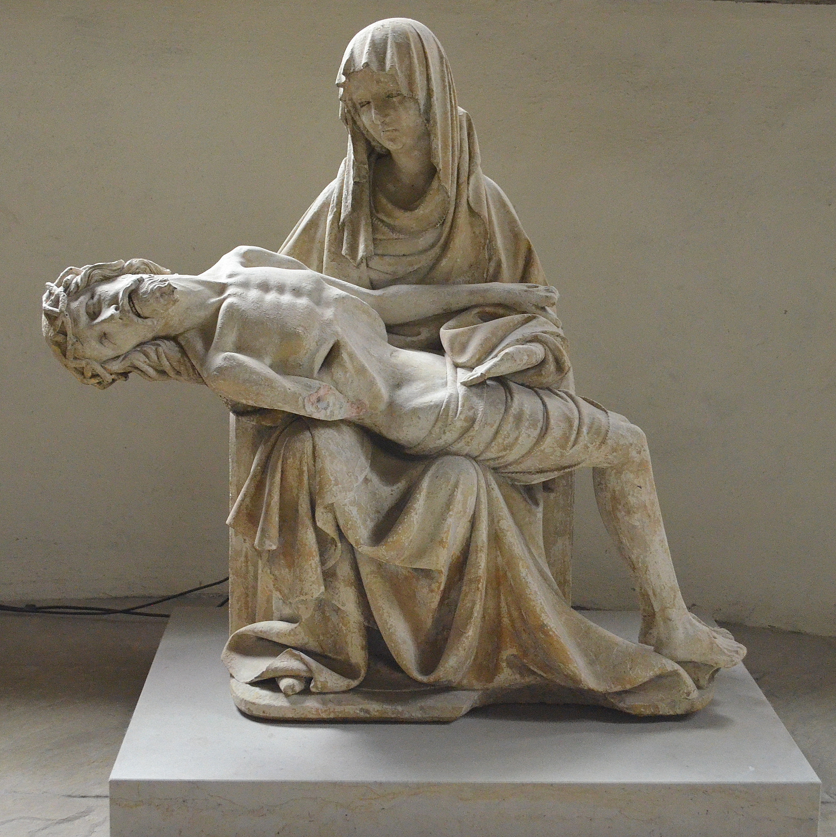 Maagdenburg, domkerk, piëta